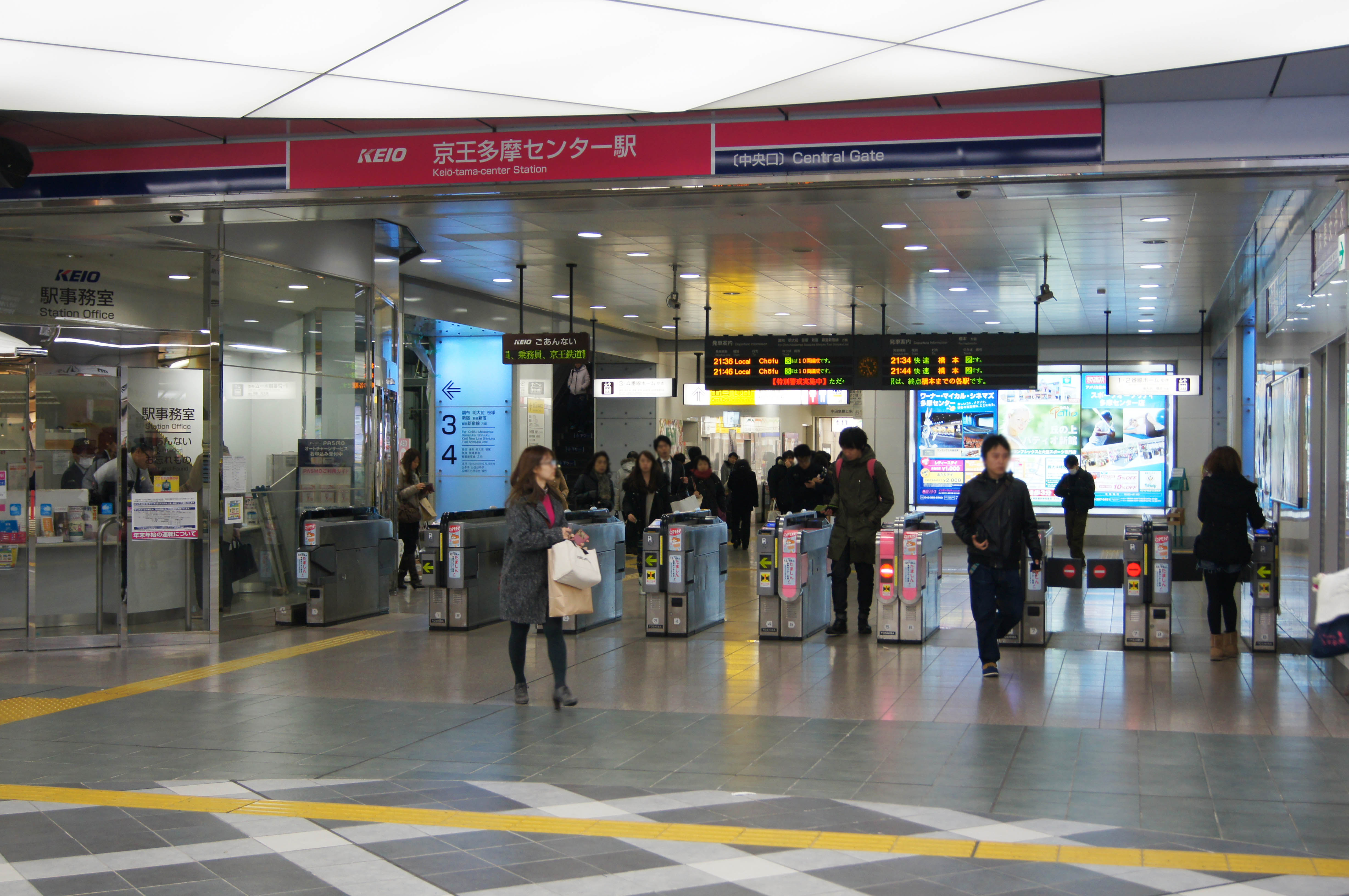 京王電鉄 京王相模原線 京王多摩センター駅 中央口 2011/12/24 mfuji810撮影